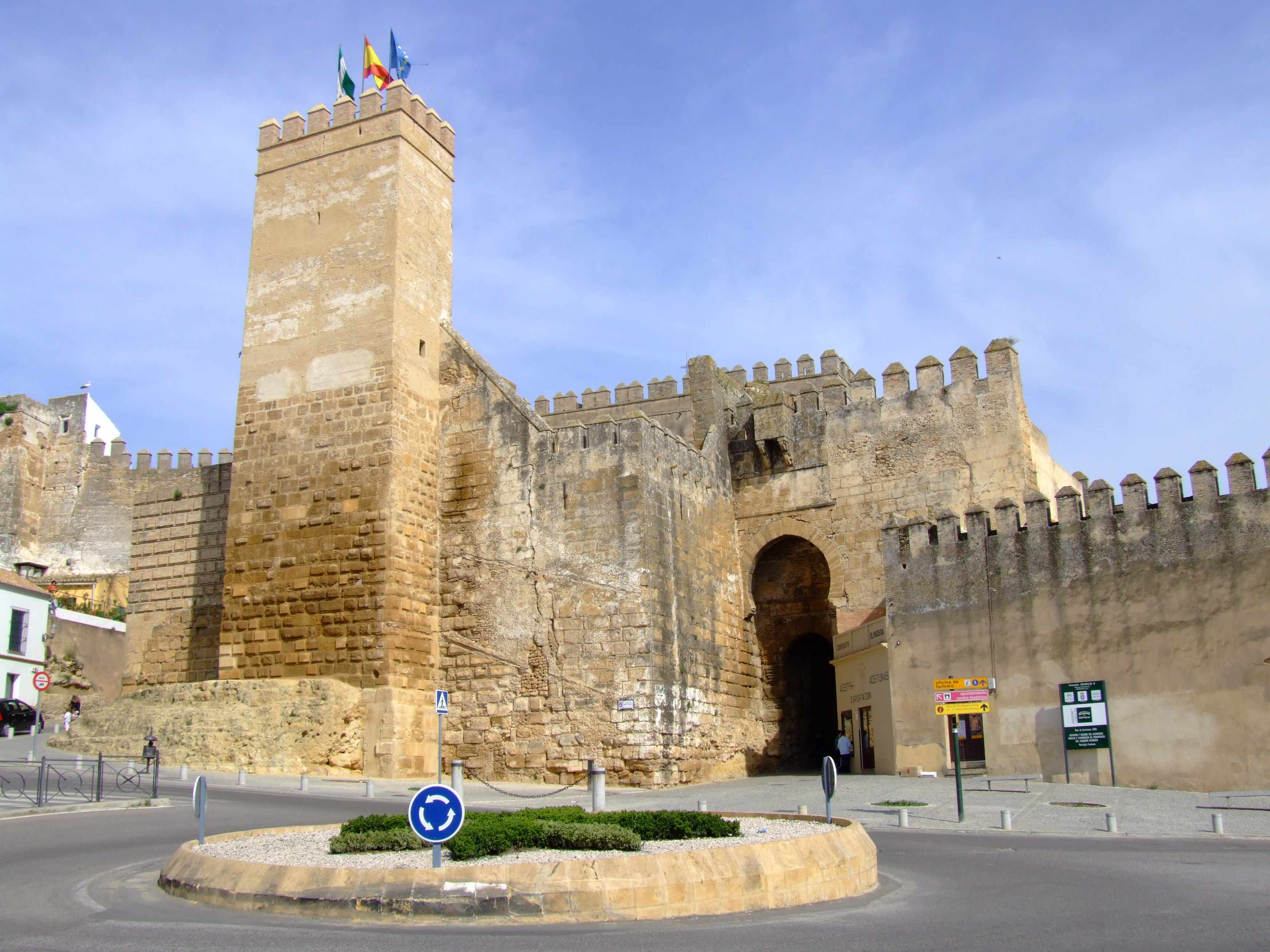 Alcázar de la Puerta de Sevilla. Carmona (provincia de Sevilla, Andalucía).